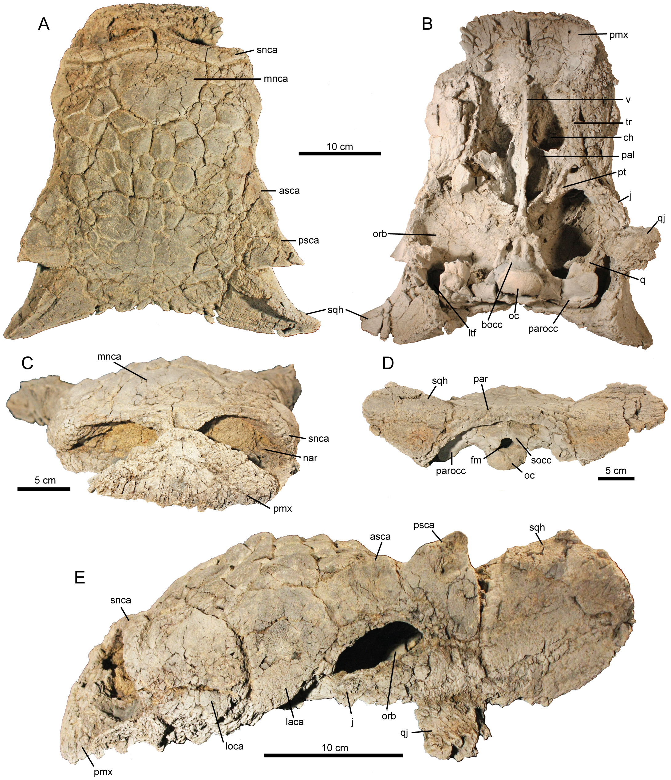 Ziapelta sanjuanensis, gen. et sp. nov., (holotype NMMNH P-64484), complete skull. A, dorsal view; B, ventral view; C, anterior view; D, occipital view; and E, left lateral view. Abbreviations: asca, anterior supraorbital caputegulum; bas, basioccipital; ch, choana; fm, foramen magnum; j, jugal; laca, lacrimal caputegulum; loca, loreal caputegulum; ltf, laterotemporal fenestra; mnca, median nasal caputegulum; nar, external naris; oc, occipital condyle; orb, orbit; pal, palatine; par, parietal; parocc, paroccipital process; pmx, premaxilla; psca, posterior supraorbital caputegulum; pt, pterygoid; q, quadrate; qj, quadratojugal; qjh, quadratojugal horn; snca, supranarial caputegulum; socc, supraoccipital; sqh, squamosal horn; tr, tooth row; v, vomer.